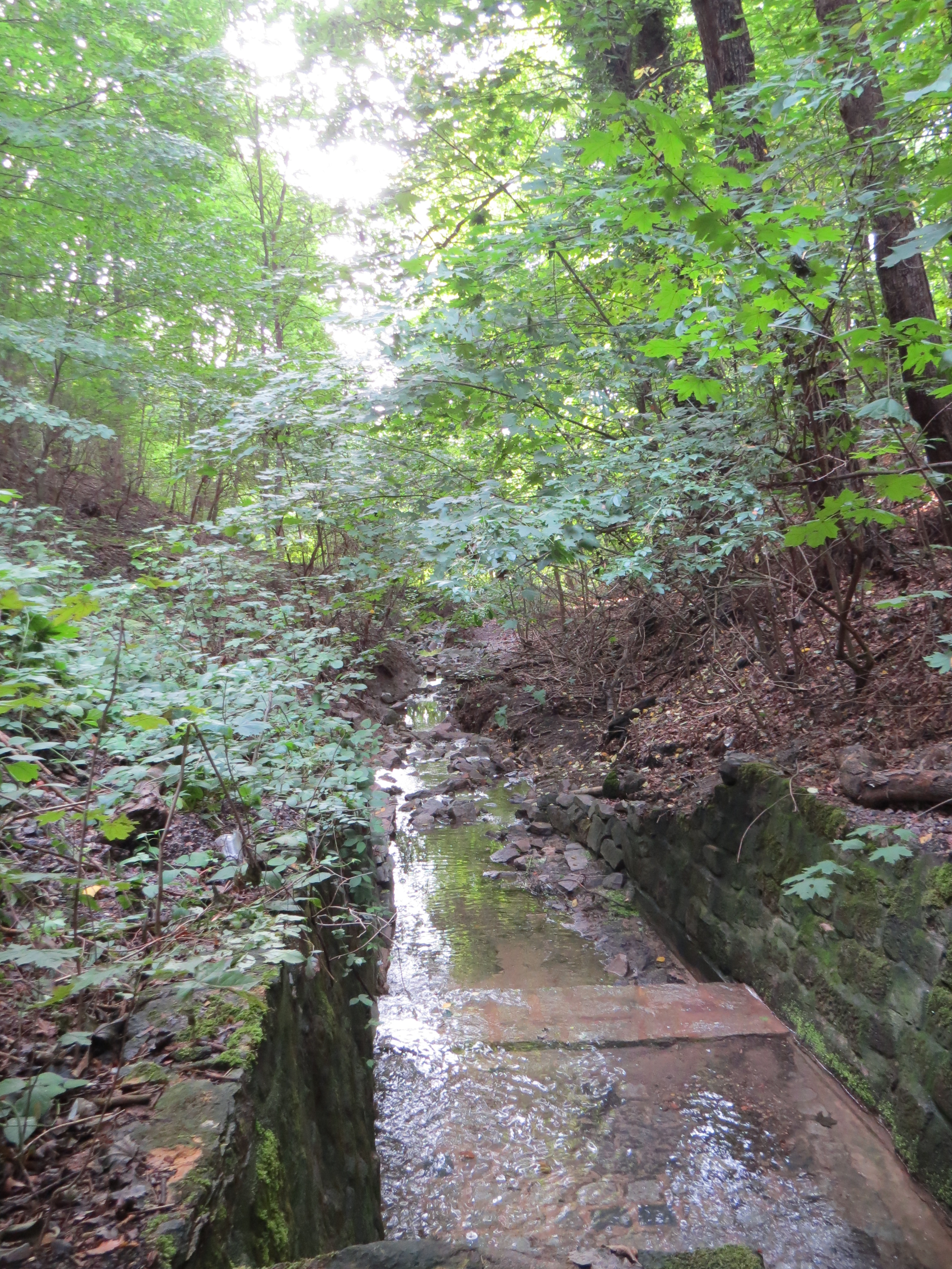 Der Burgker Bach, Ansicht talwärts, in Höhe des ehemaligen Real-Supermarktes.